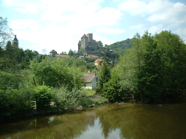 Bildbeschreibung: Stadt Hardegg mit Burg Hardegg von der Brücke über die Thaya aus gesehen Quelle: selbst fotografiert Fotograf/Zeichner: Stephan Reuthner Datum: 6/2005